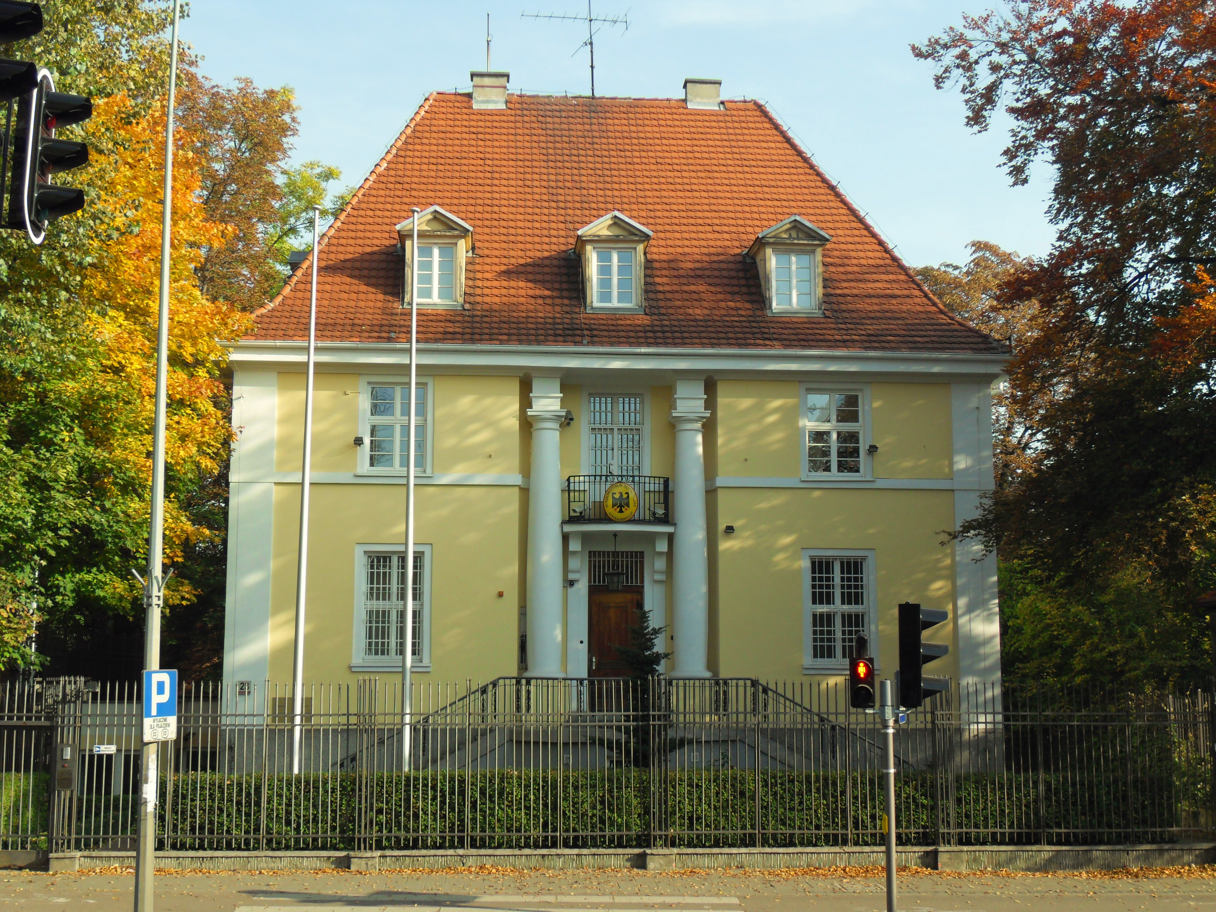 Gdańsk Wrzeszcz, al. Zwycięstwa 23 (Konsulat Niemiec).